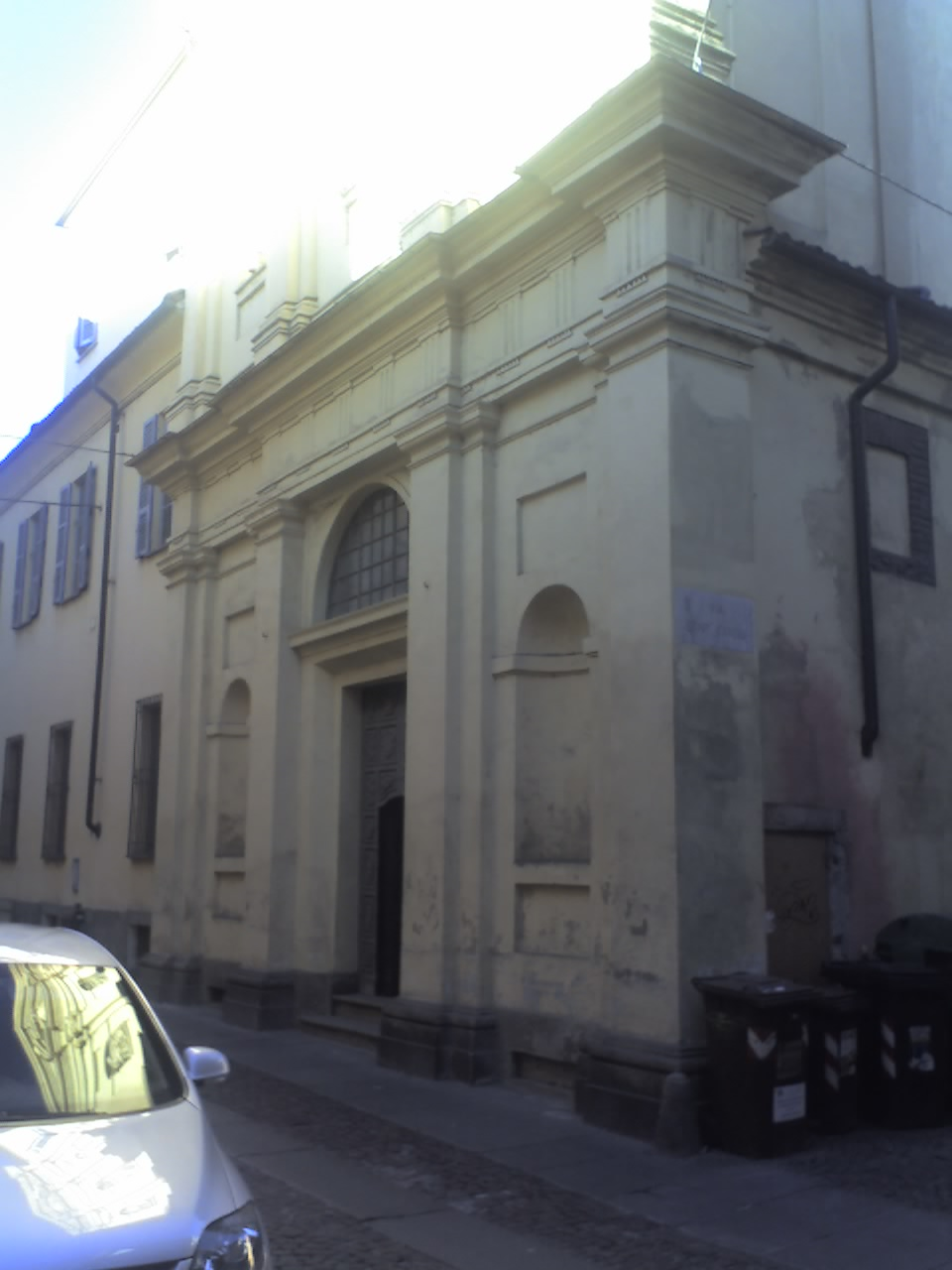 Casale Monferrato, chiesa di San Michele - Facciata, parte inferiore